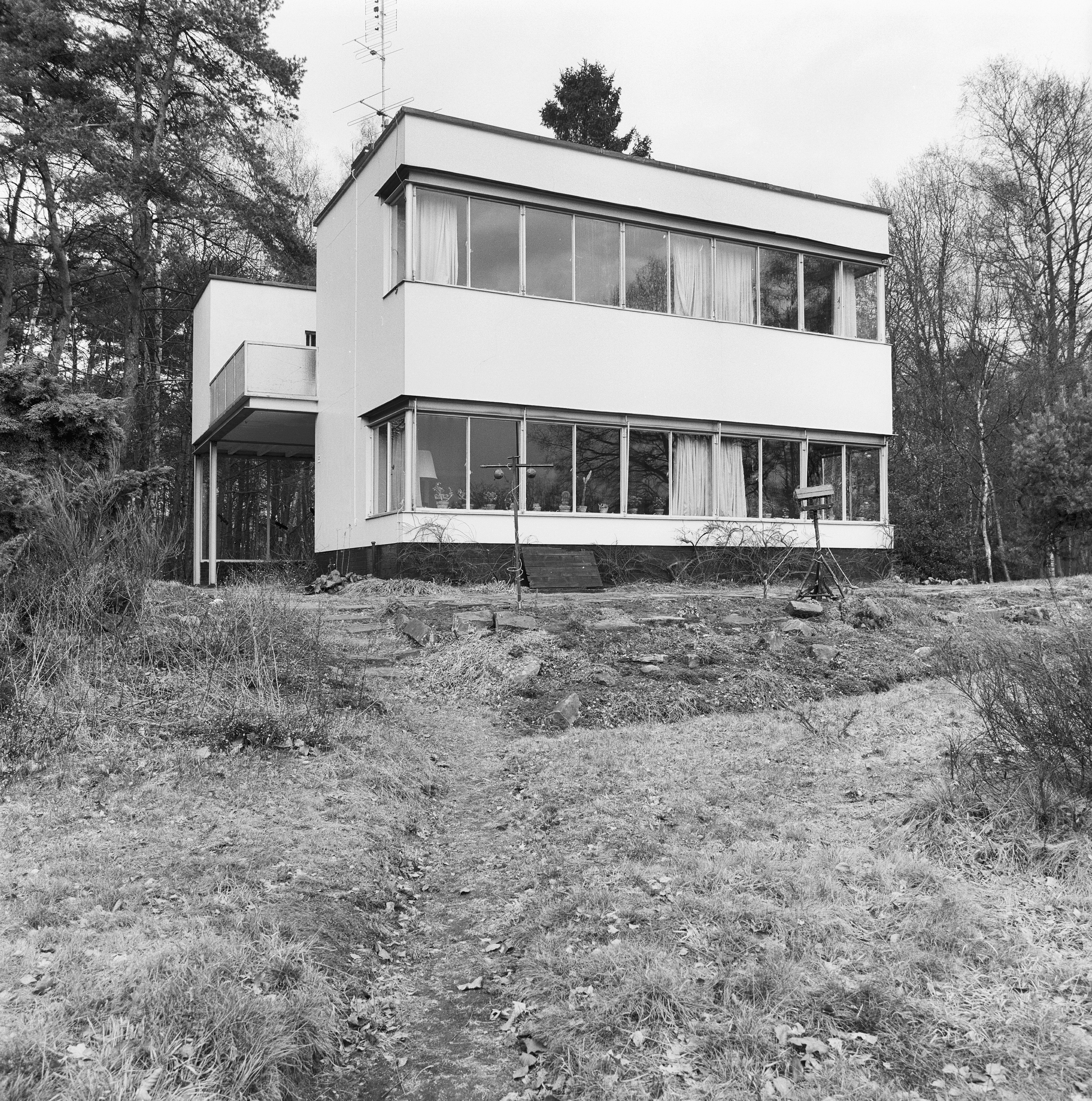 Huis Zijlstra: zuidzijde